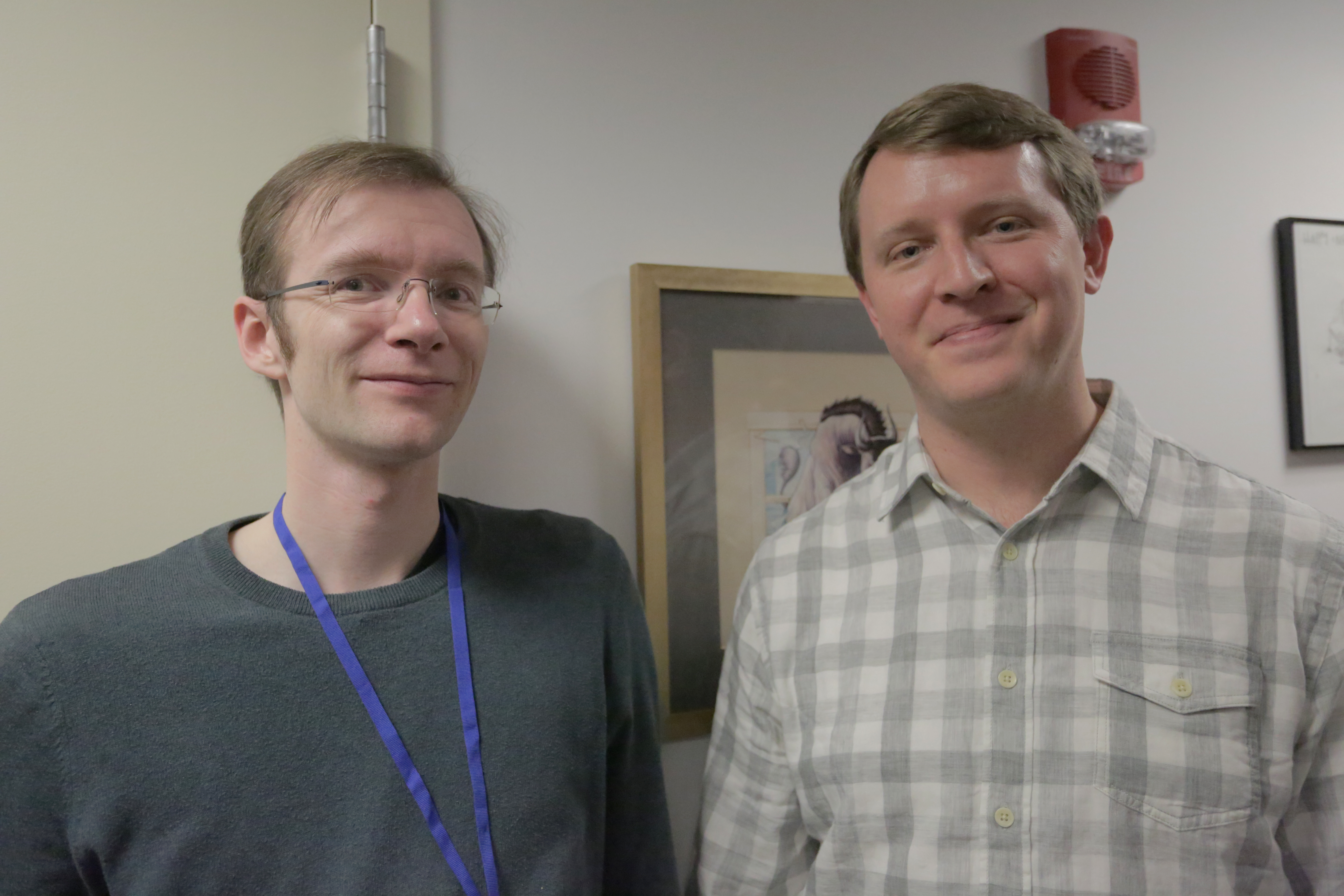 Matthew Garrett e John Sullivan